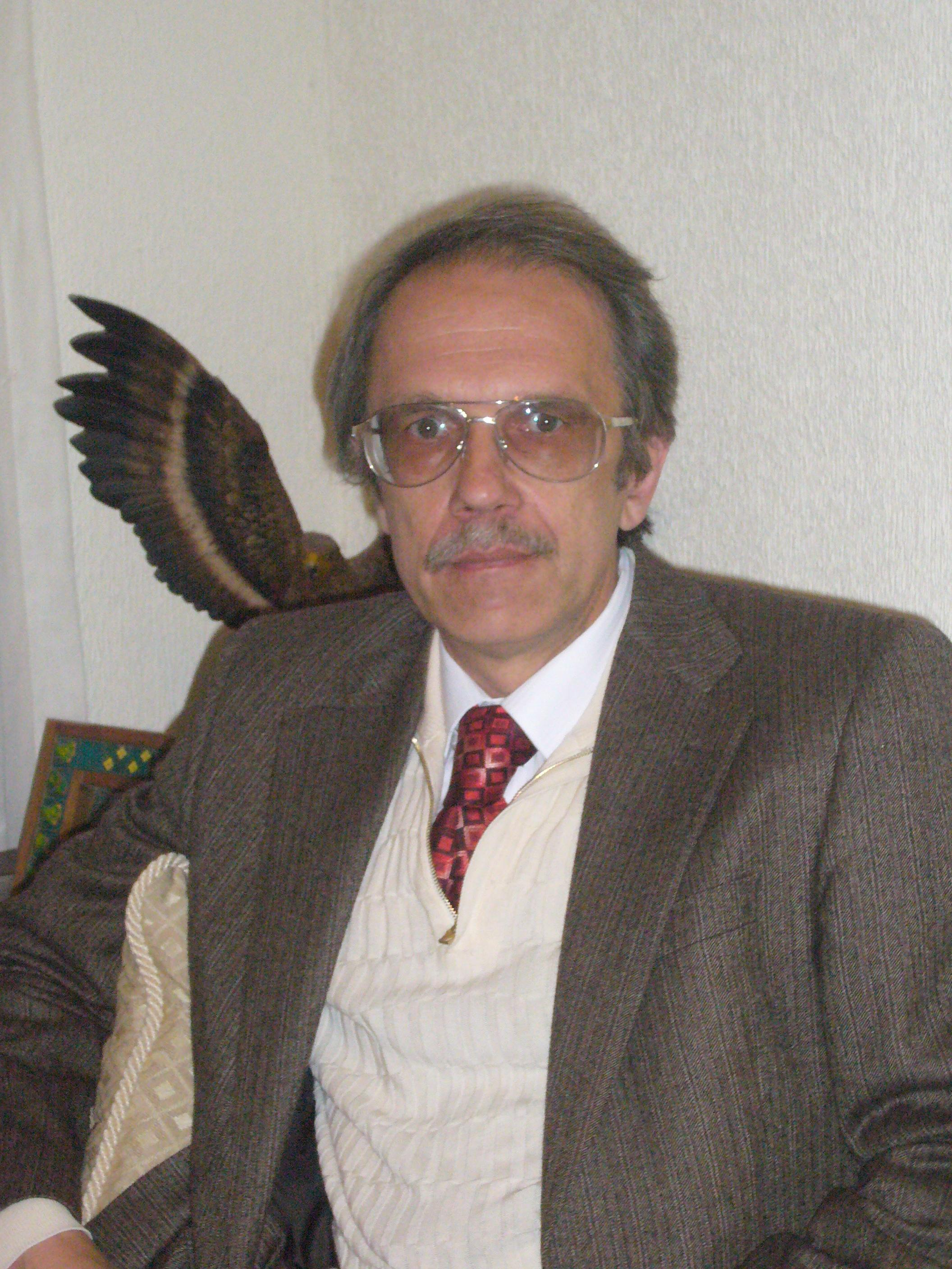 Photo of Alexander Balankinin 2007 (Alexander Balankin, Баланкин, Александр Сергеевич)